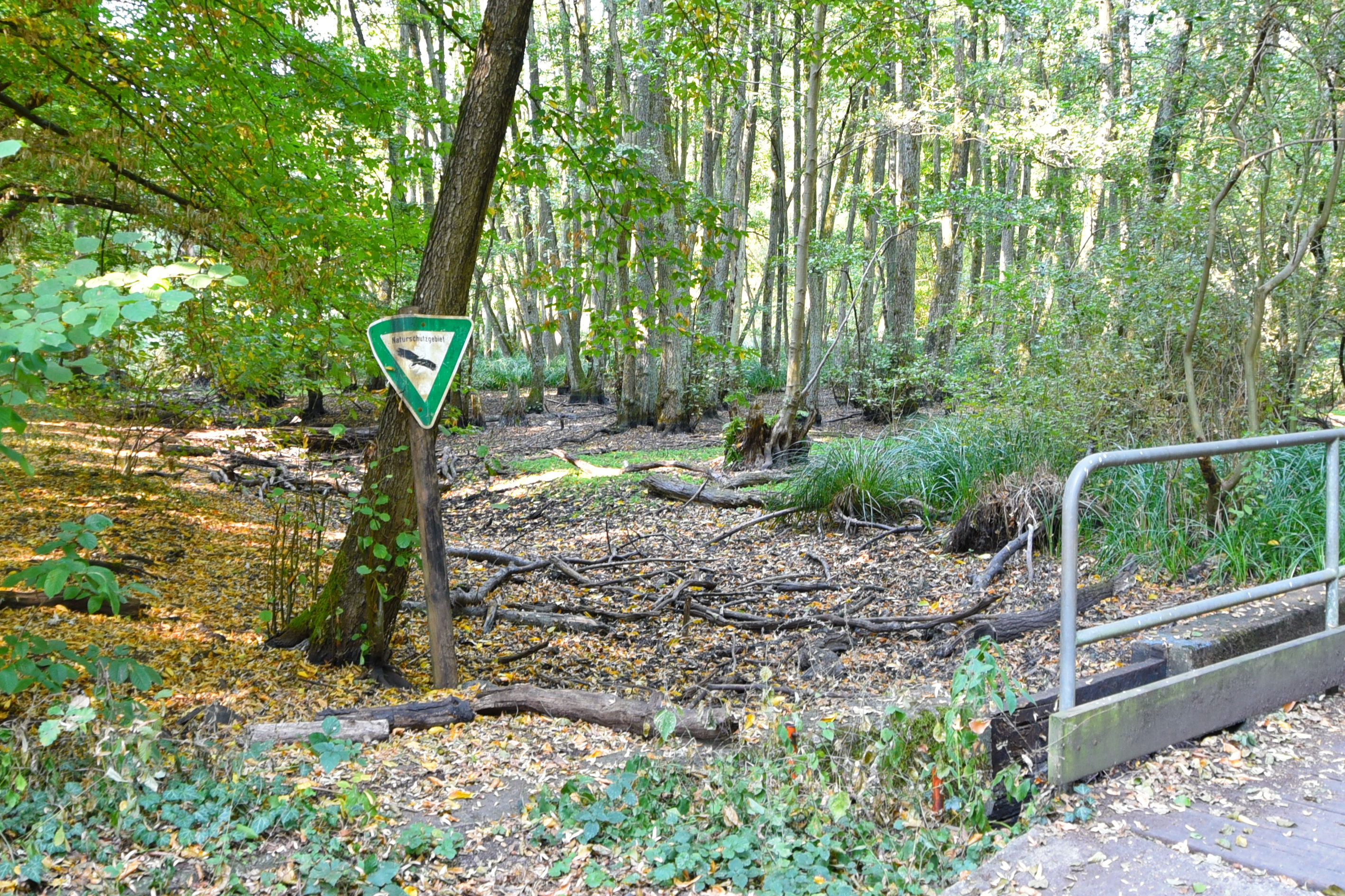 Das Naturschutzgebiet Pechgraben bei Klein-Krotzenburg (NSG-Kennung 1438022) liegt im hessischen Landkreis Offenbach.